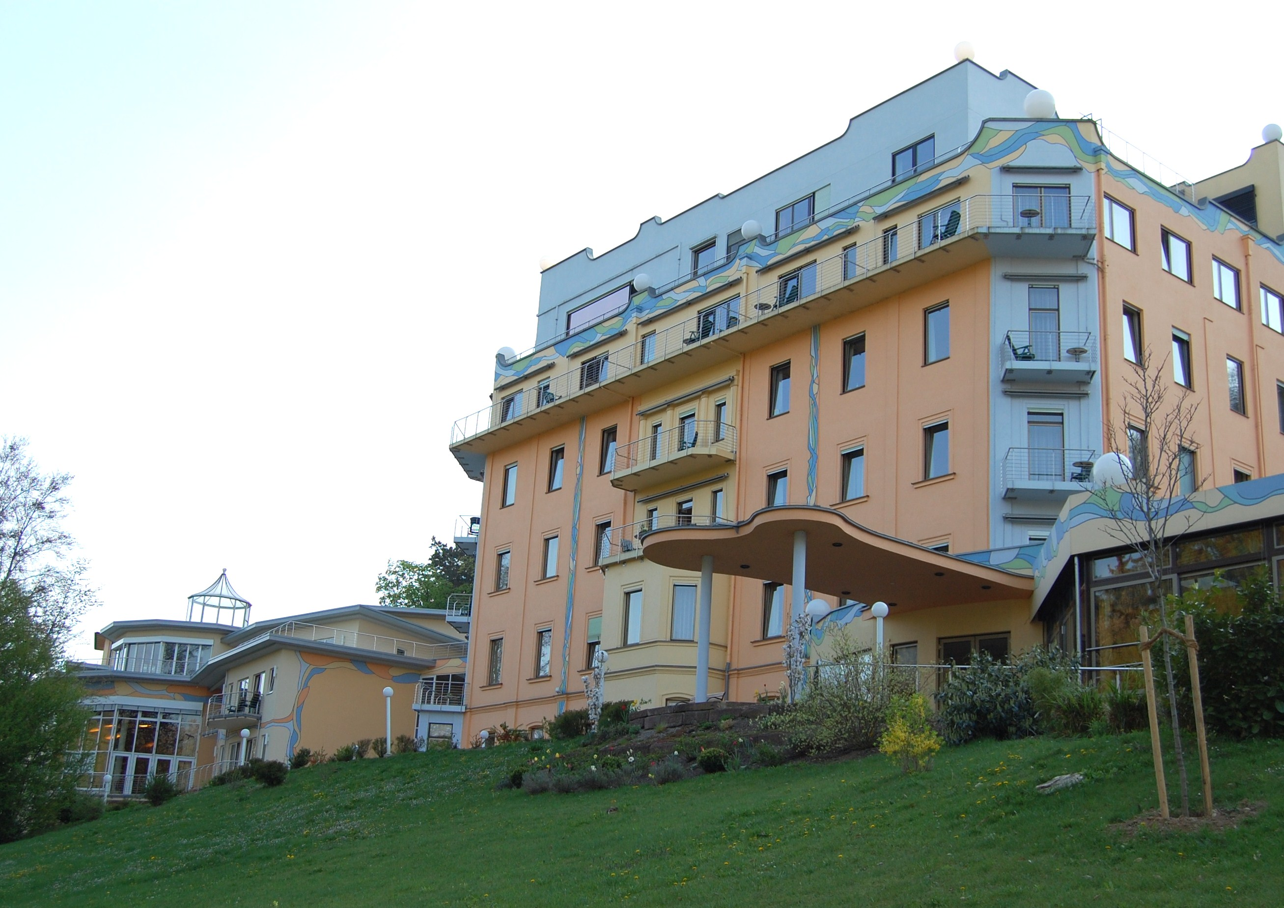 Parkklinik Heiligenfeld, eine Fachklinik der Heiligenfeld-Gruppe in Bad Kissingen